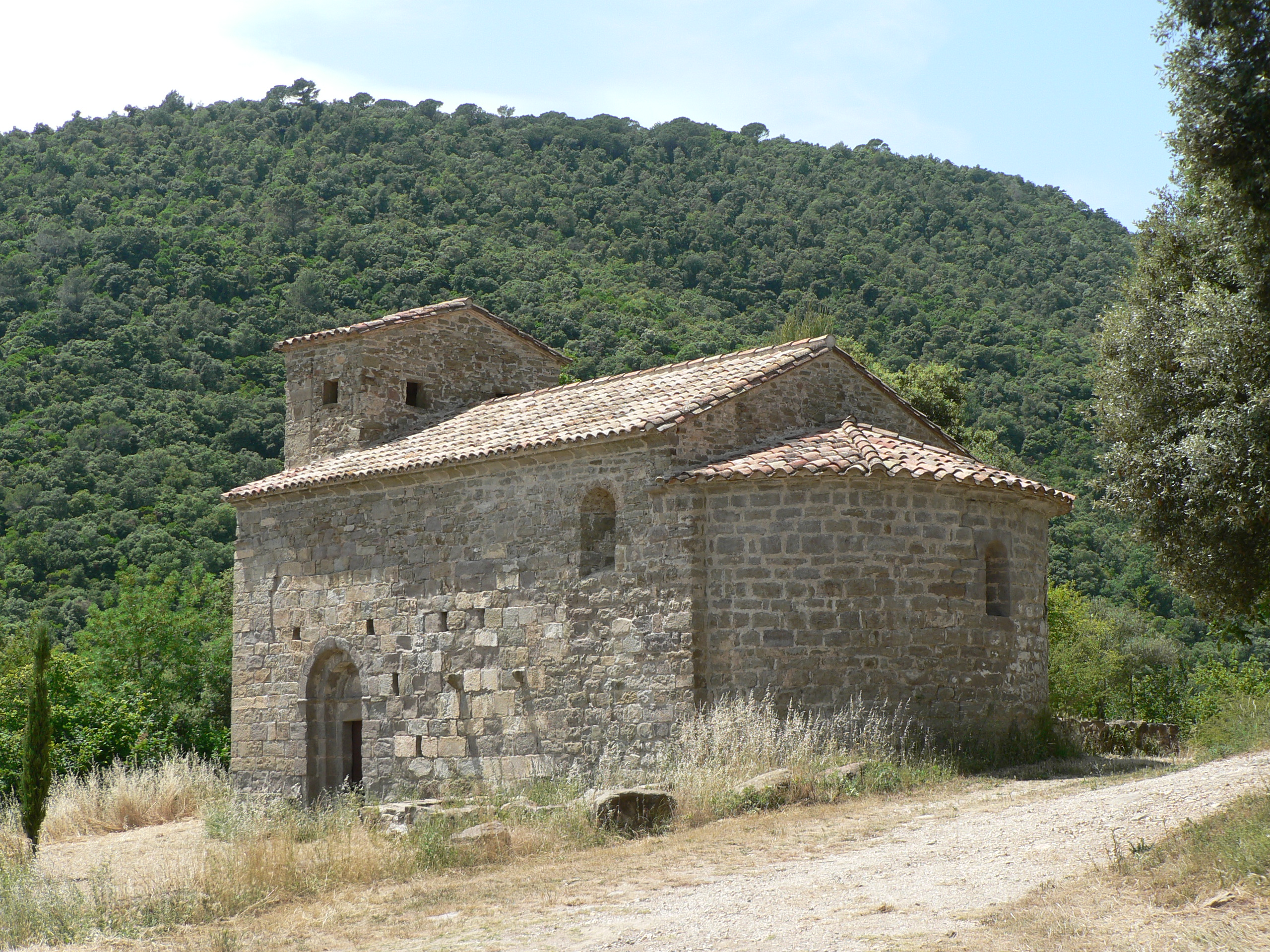 Ermita de Sant Fruitós, al municipi de Sant Ferriol